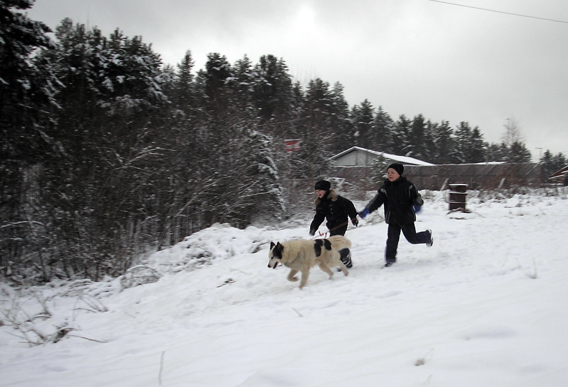 Прогулка детей с ездовыми собаками в рамках канистерапии. Республика Карелия, РФ